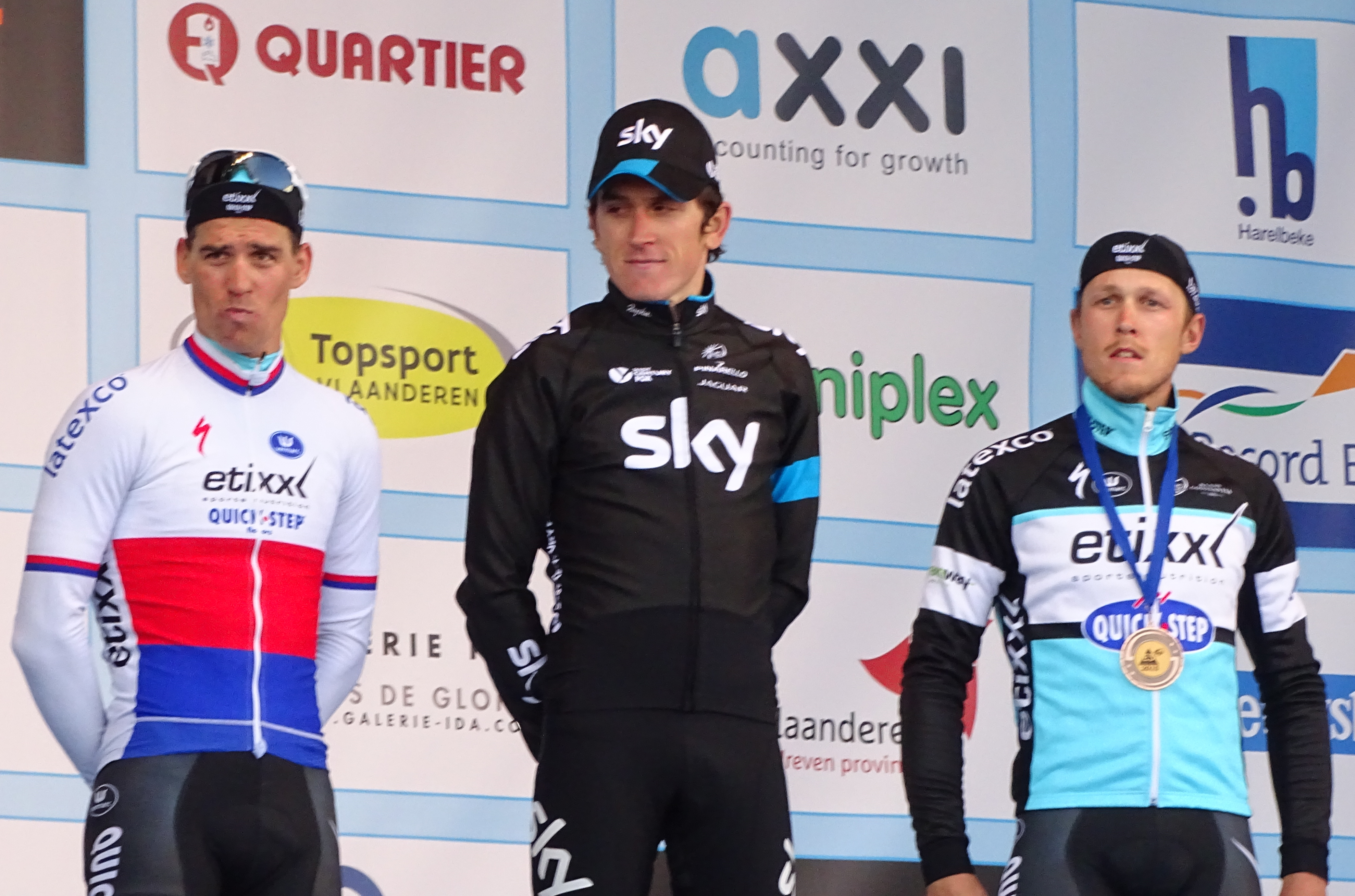 Reportage réalisé le vendredi 27 mars à l'occasion du départ et de l'arrivée du Grand Prix E3 2015 à Harelbeke, Belgique.